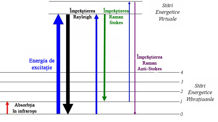 nivele energetice moleculare si efectul Raman